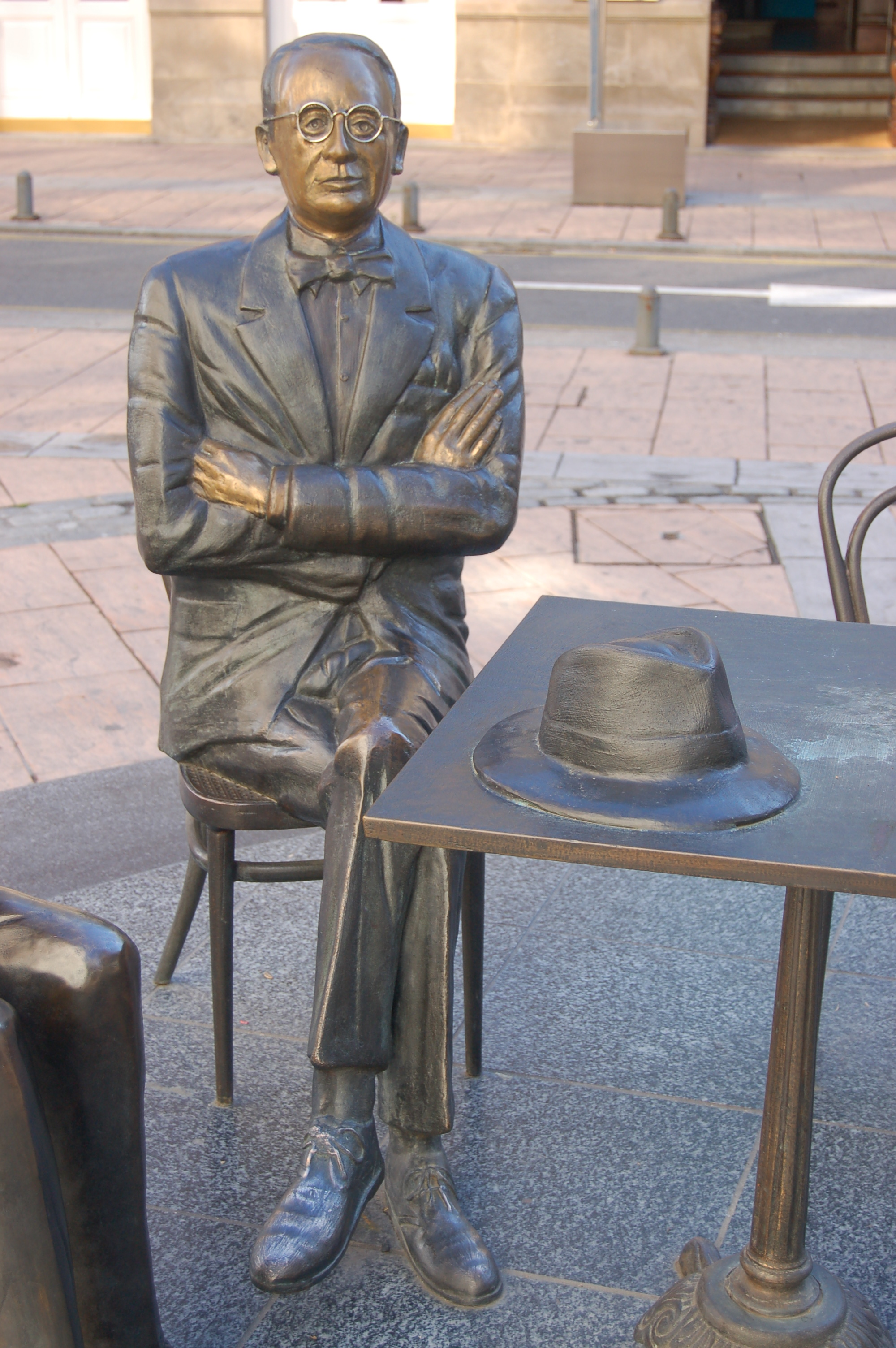 Estatua de Castelao en Pontevedra. Categoría:Imaxes de Pontevedra Categoría:Imaxes de escritores en lingua galega